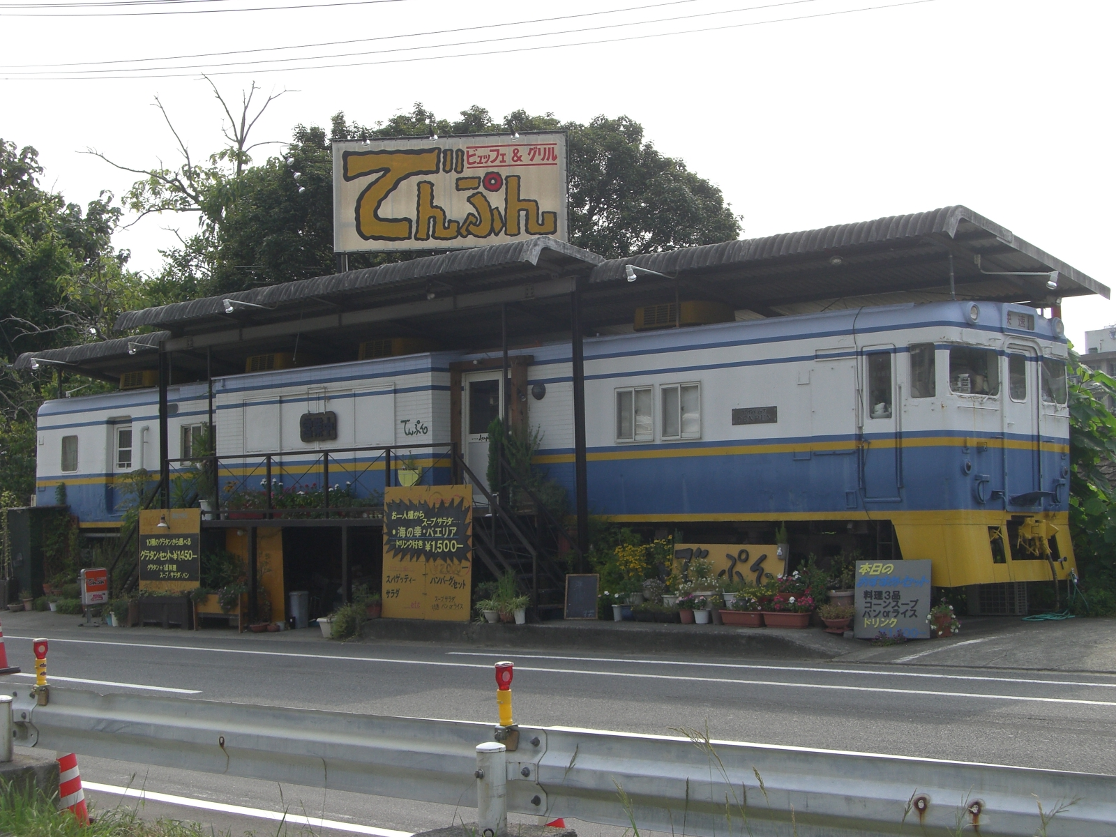 松山市内でレストランとして利用されているキユ25 1